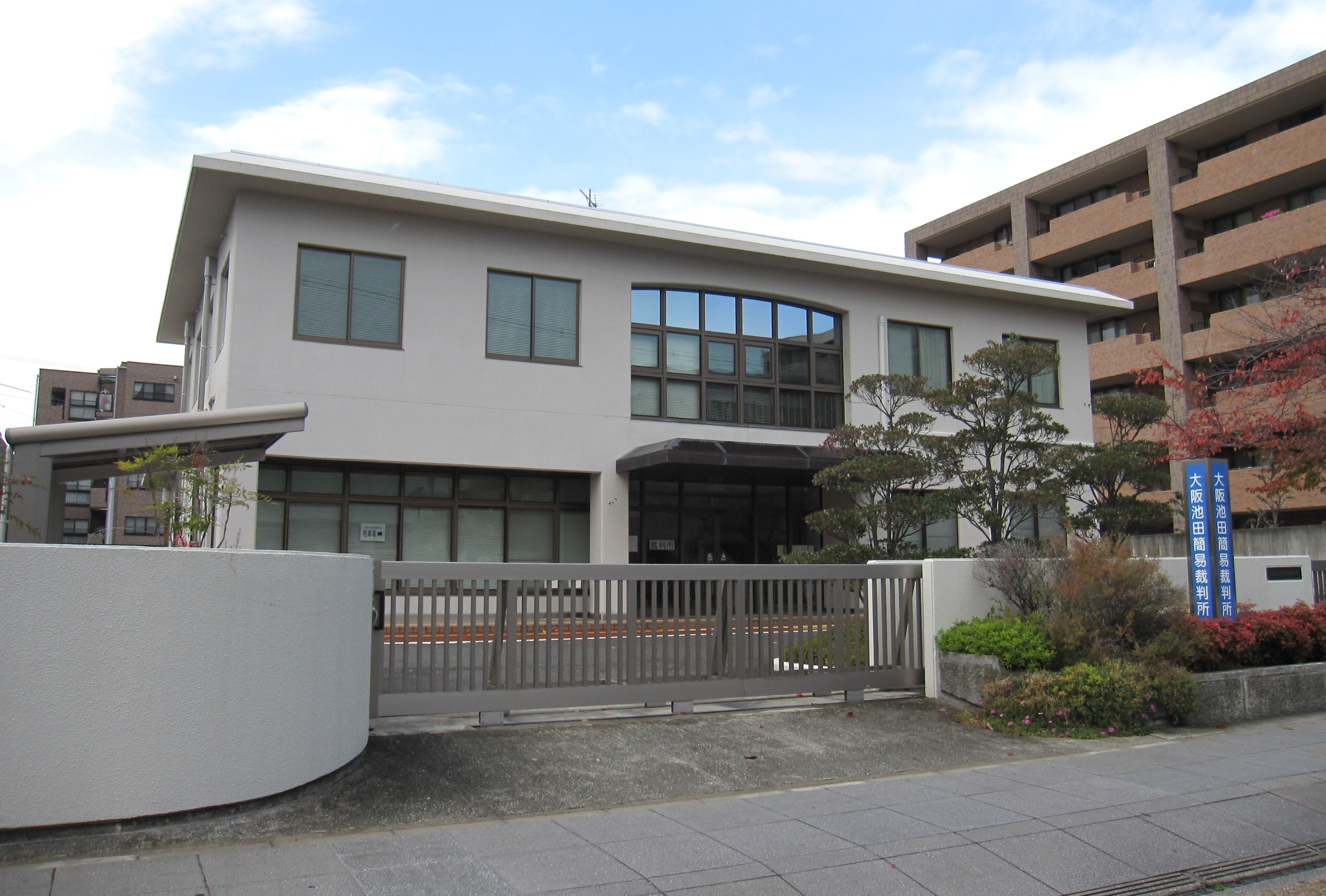 大阪池田簡易裁判所